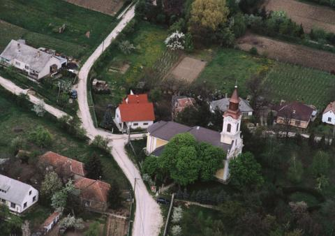 Lesencetomaj, Hungary, aerial photography. Szent Anna római katolikus templom